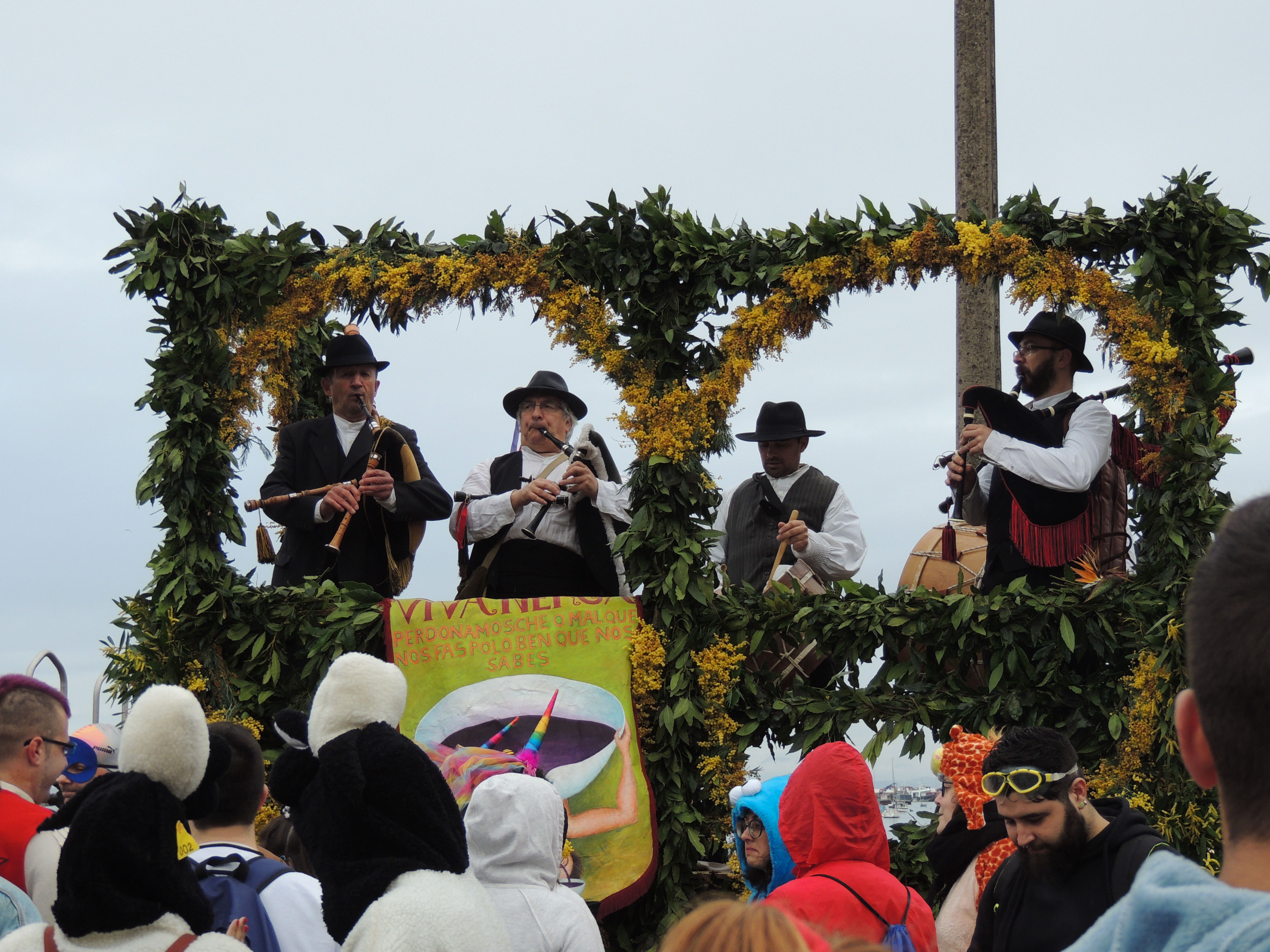 Os gaiteiros de Nerga tocando na estrada de Vilariño no 2018.